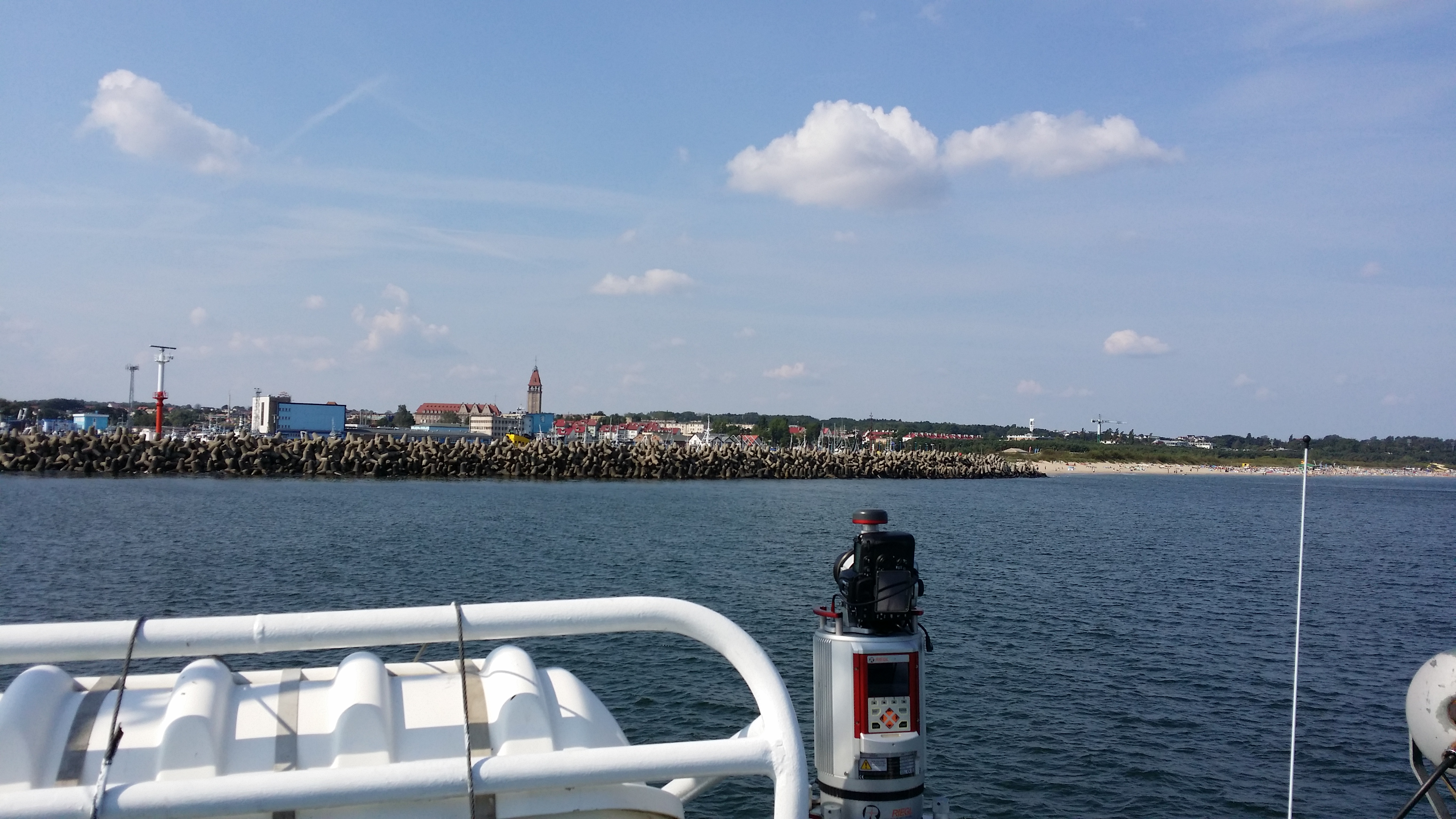 Skaning z morza (MarLS) Władysławowo - Katedra Geodezji Politechniki Gdańskiej i Apeks Gdańsk, na KH Tucana Urzędu Morskiego w Gdyni (2014)